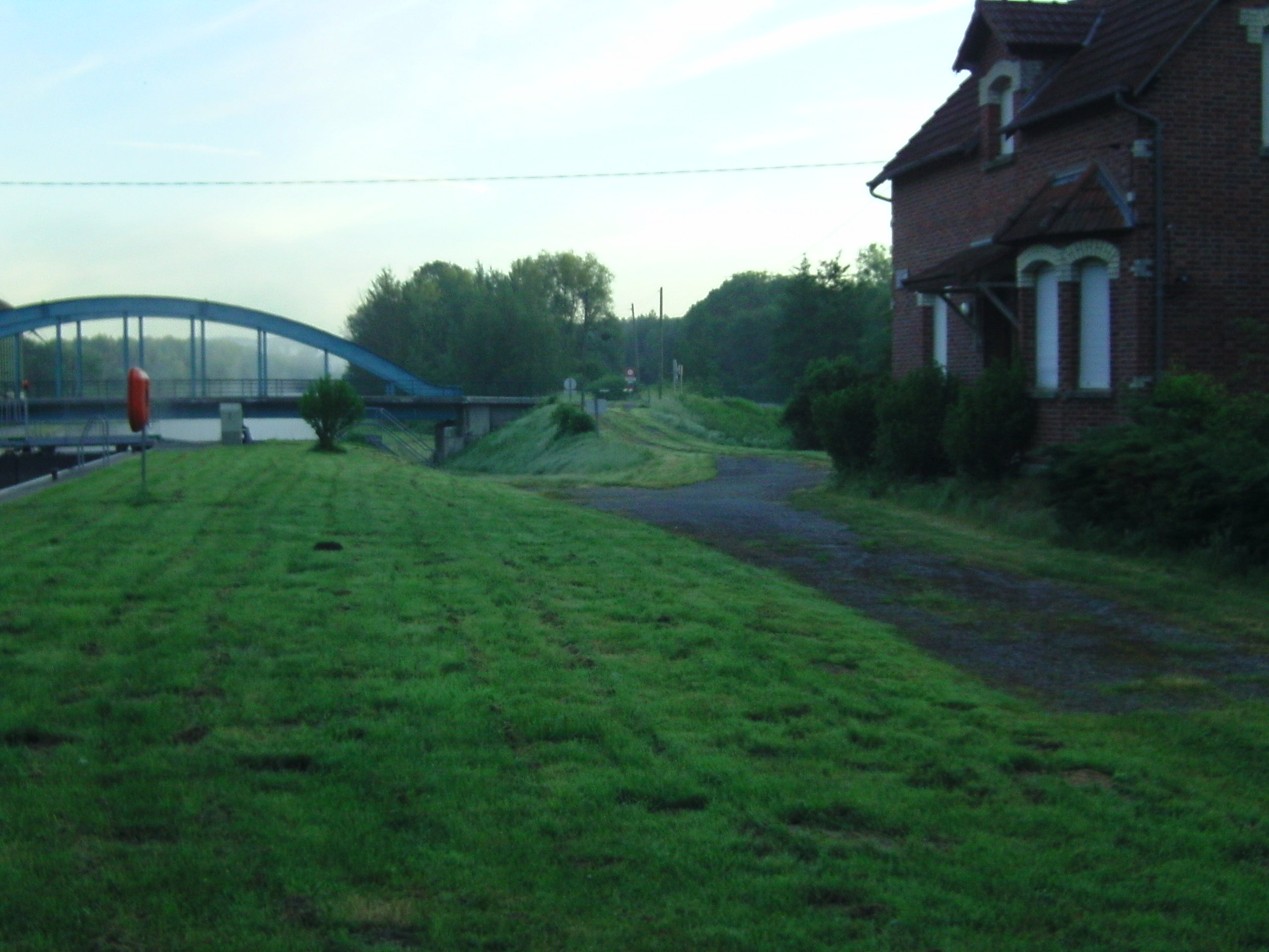 c'est la nationale 2 (avant d'etre detournée) qui passe sur le pont